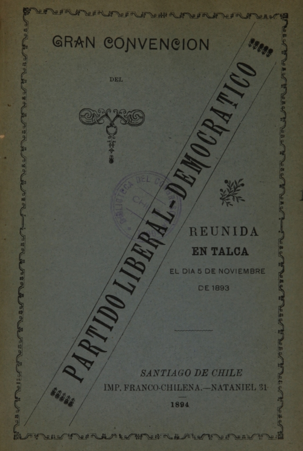 Publicación de la Constitución del Partido Liberal Democrático, ocurrida el 5 de noviembre de 1893.